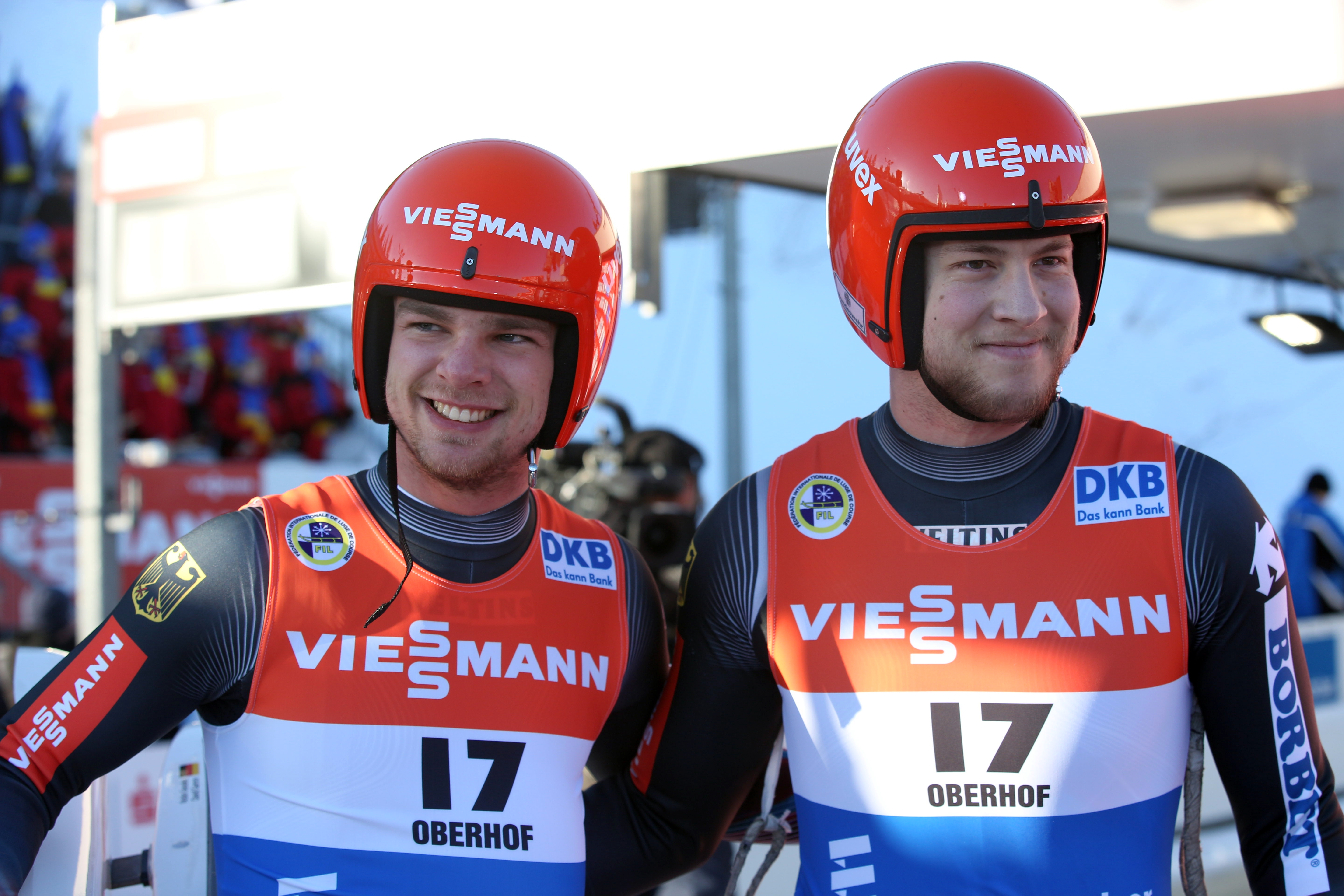 Robin Johannes Geuecke und David Gamm beim Worldcup Doppelsitzer Männer Oberhof 2017